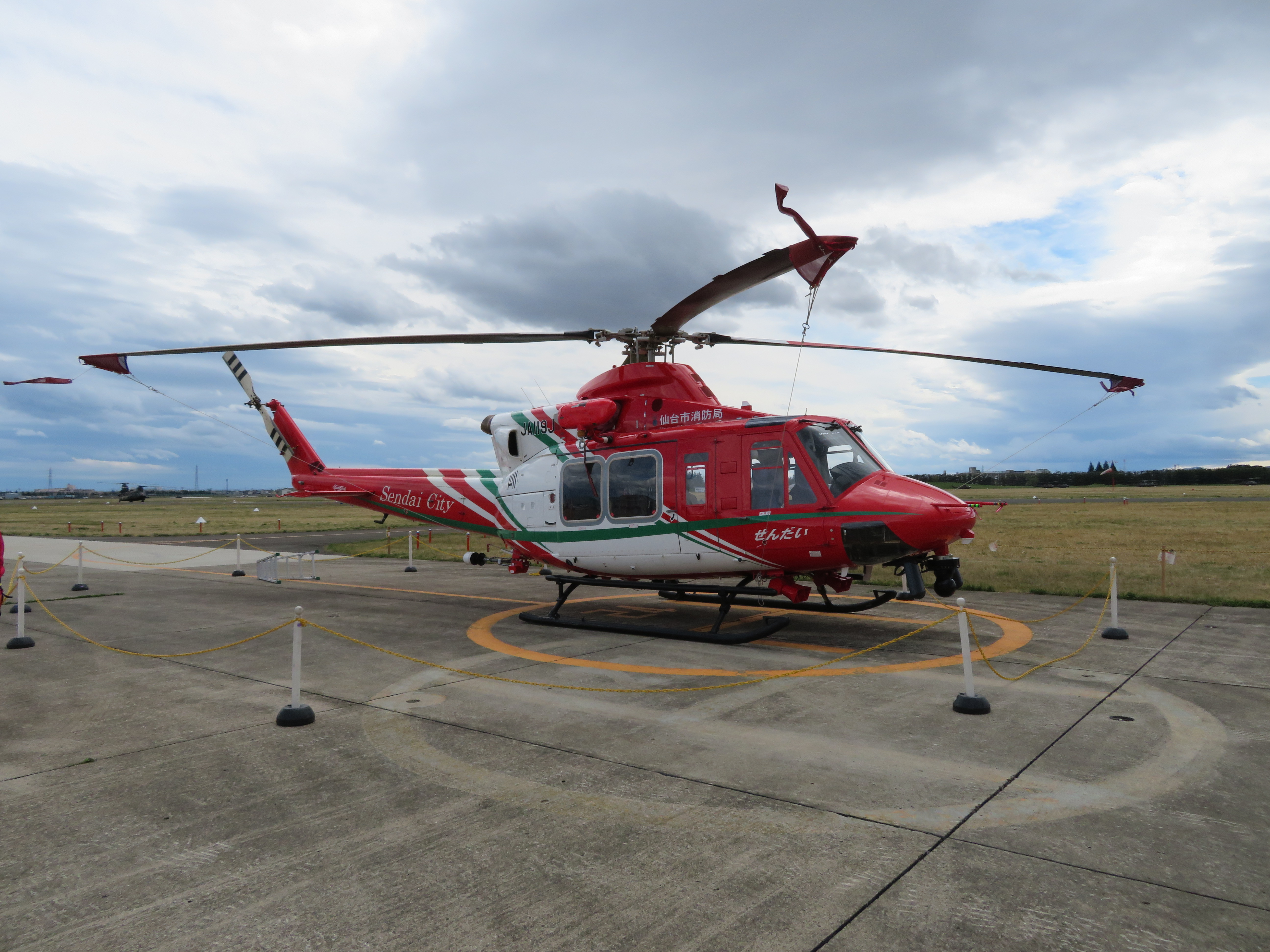 仙台市消防局のヘリコプター「せんだい」